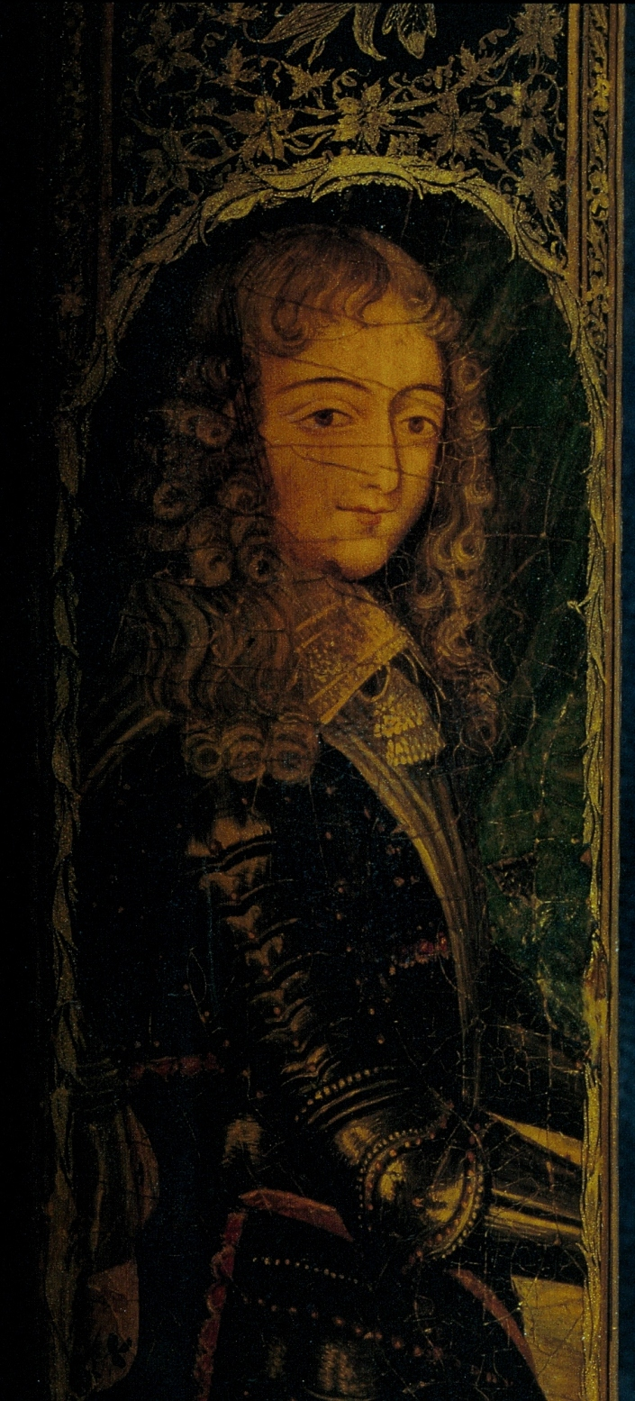 Портрет европейца, деталь.